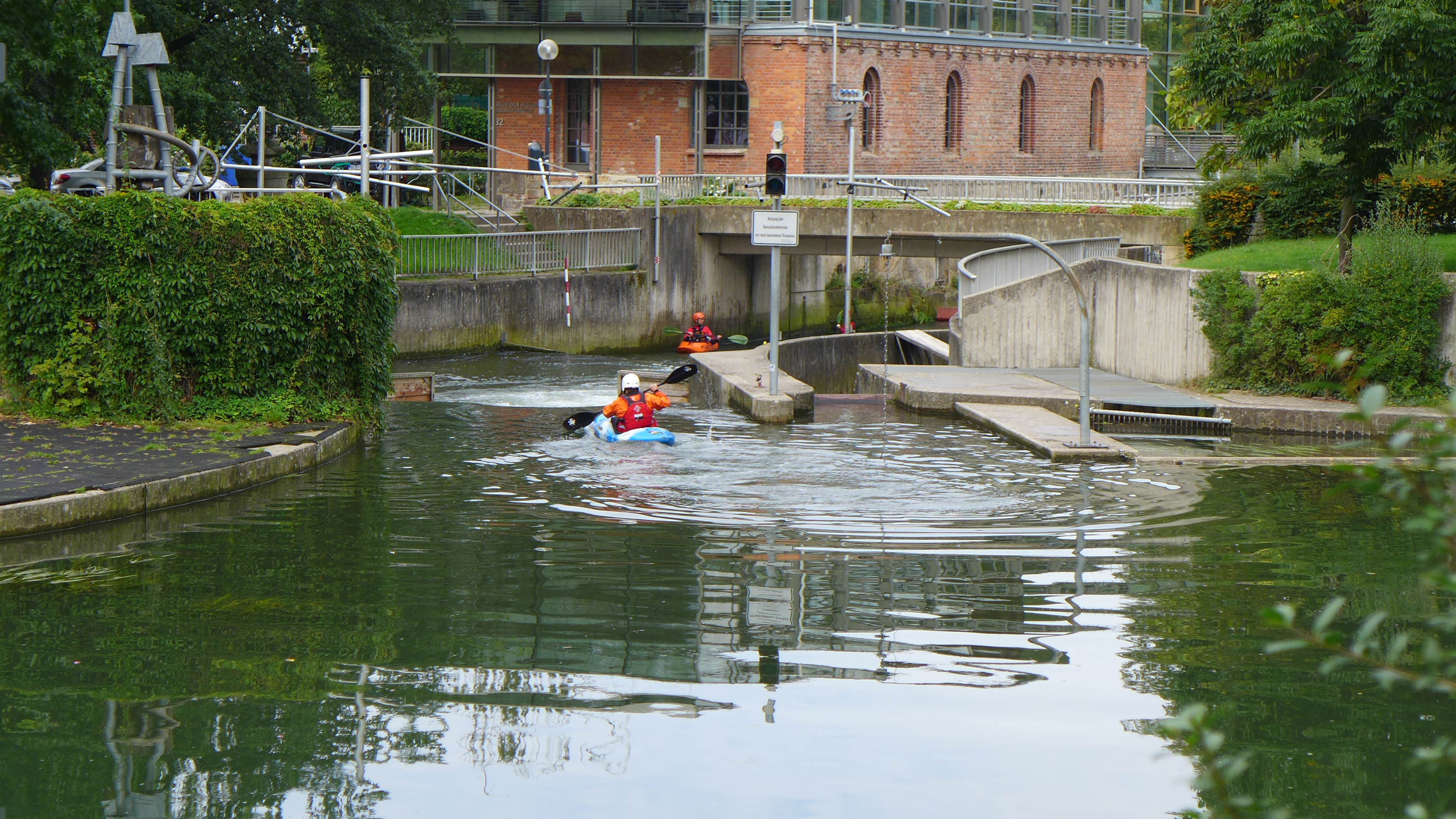 Wildwasserpaddeln an der Bischofsmühle